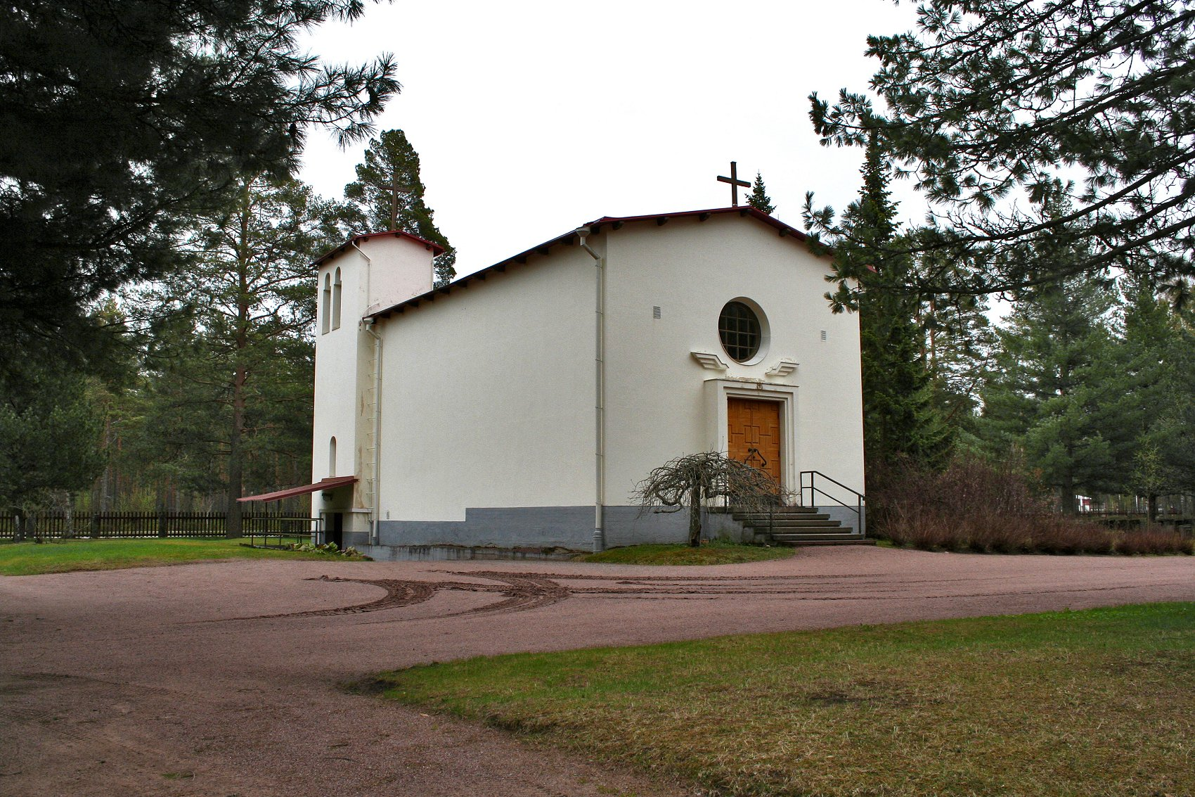 Koomankankaan hautausmaa, Kokemäki